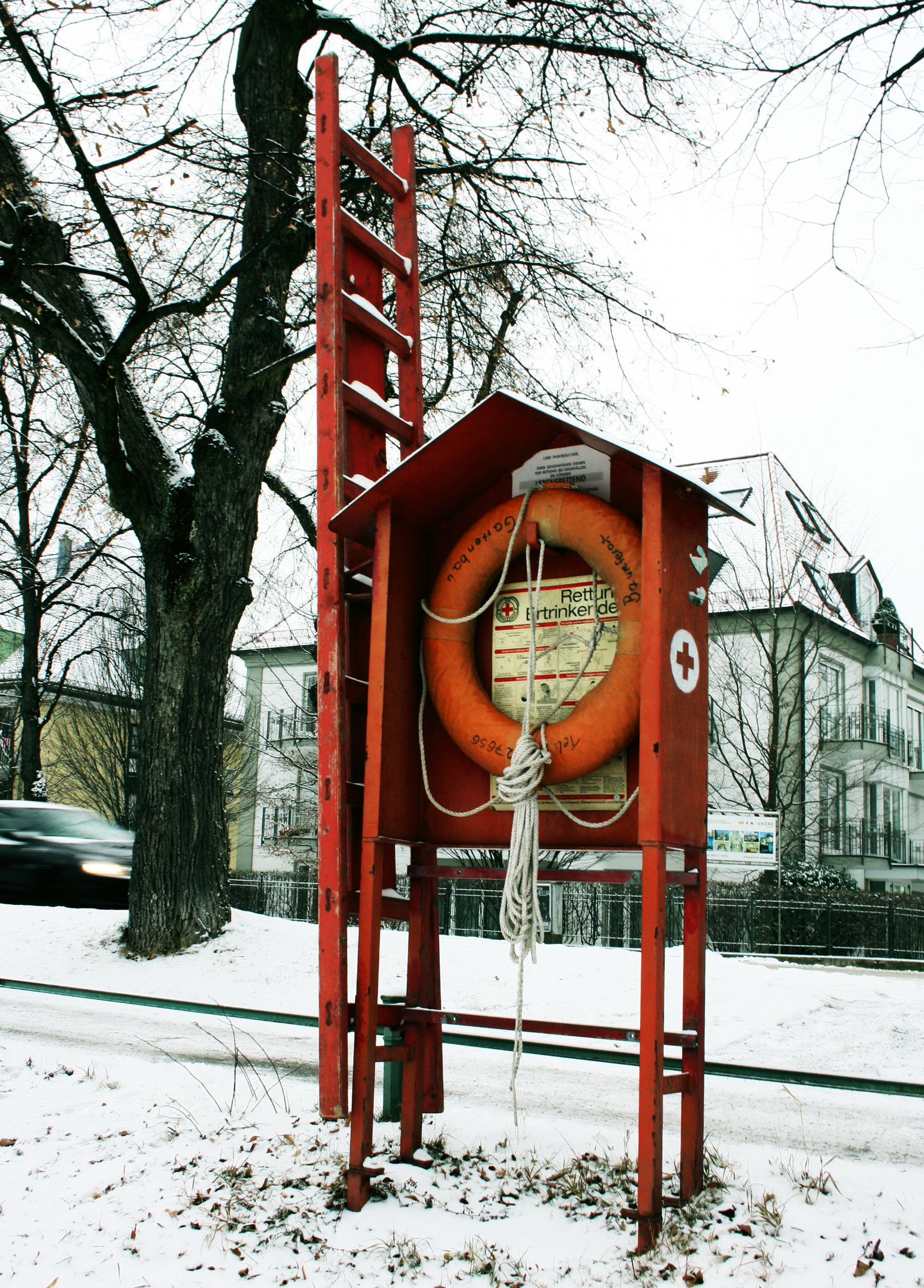 Einrichtung zur Wasser- und Eisrettung am Nymphenburger Kanal in München.